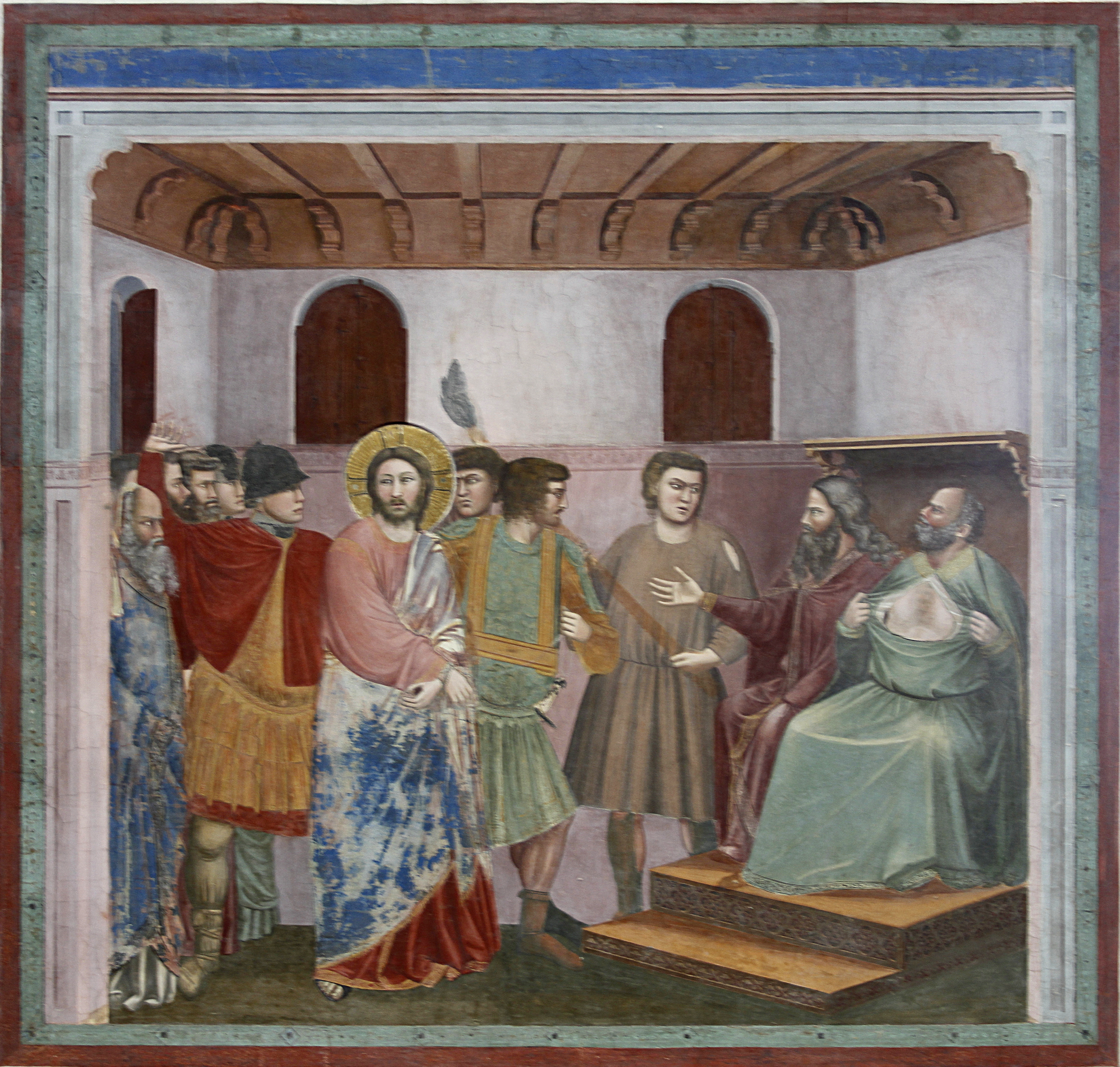 Capella dei Scrovegni - Padua